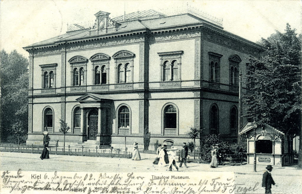 Thaulow-Museum am Sophienblatt 2 (Ecke Ziegelteich)